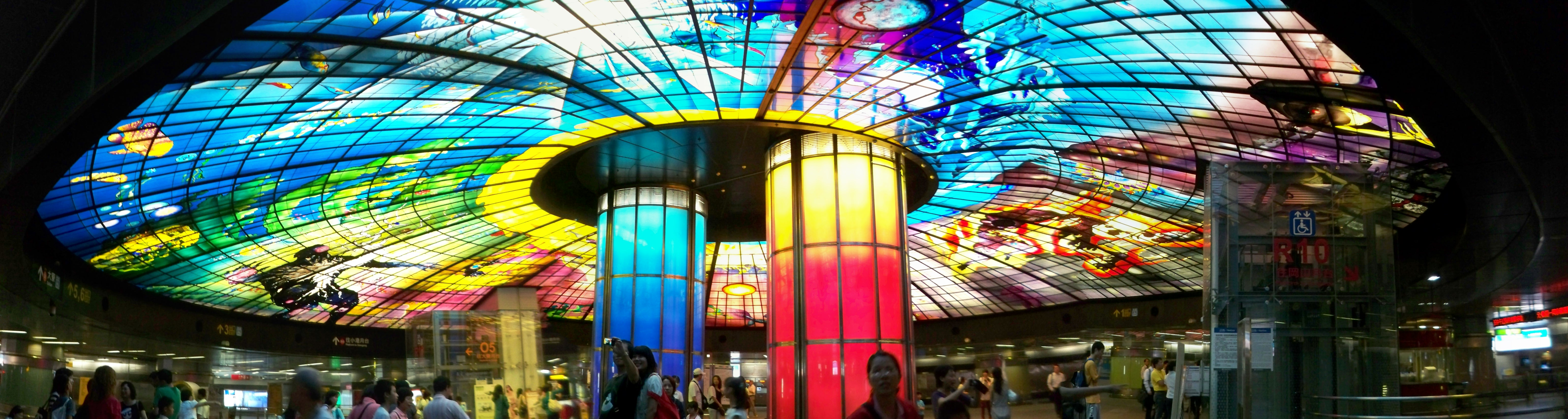 高雄捷運美麗島站地下一樓穹頂大廳公共藝術光之穹頂。